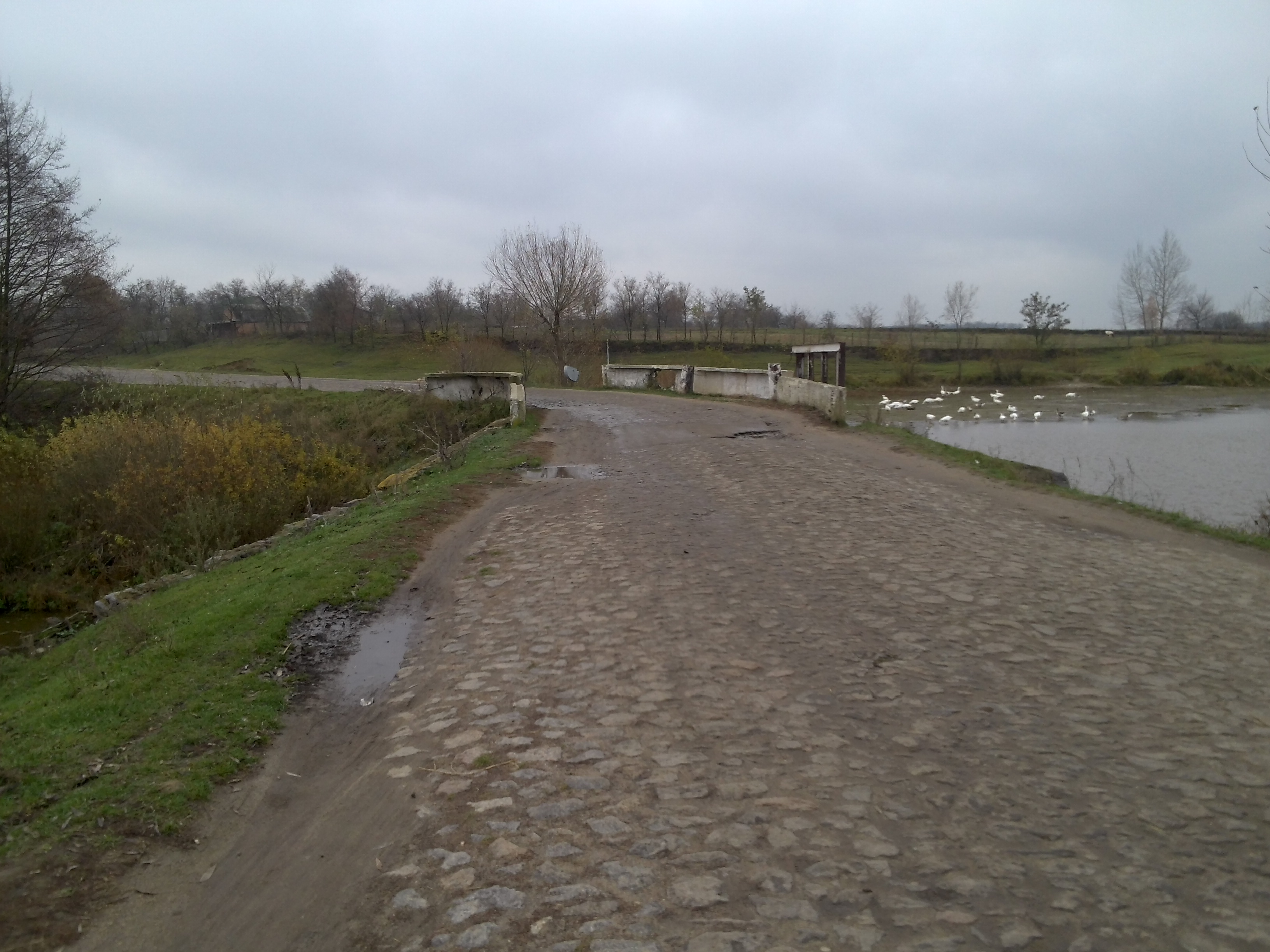 с. Косаківка. Дорога до с. Коханівка